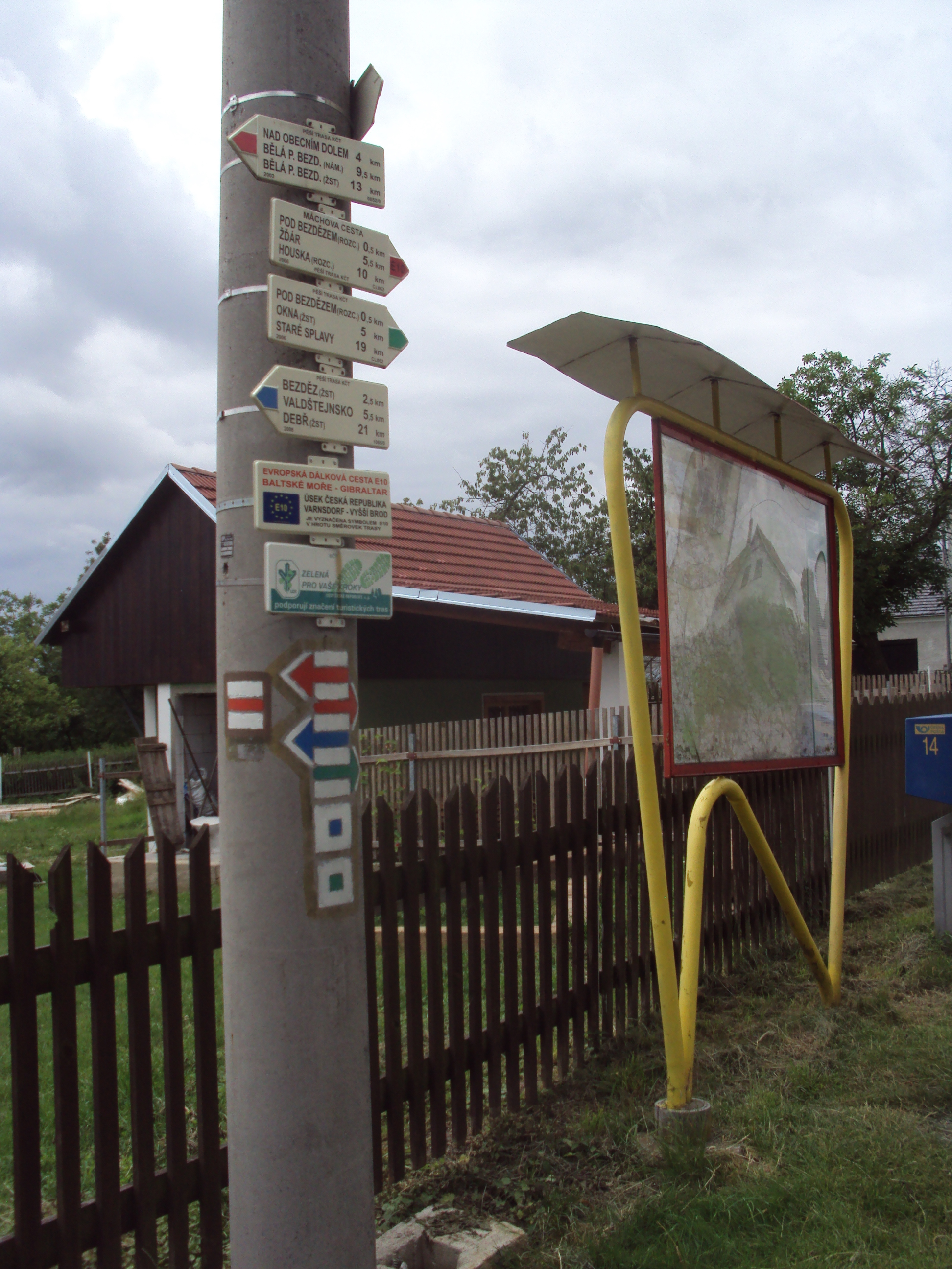 Rozcestník v obci Bezděz